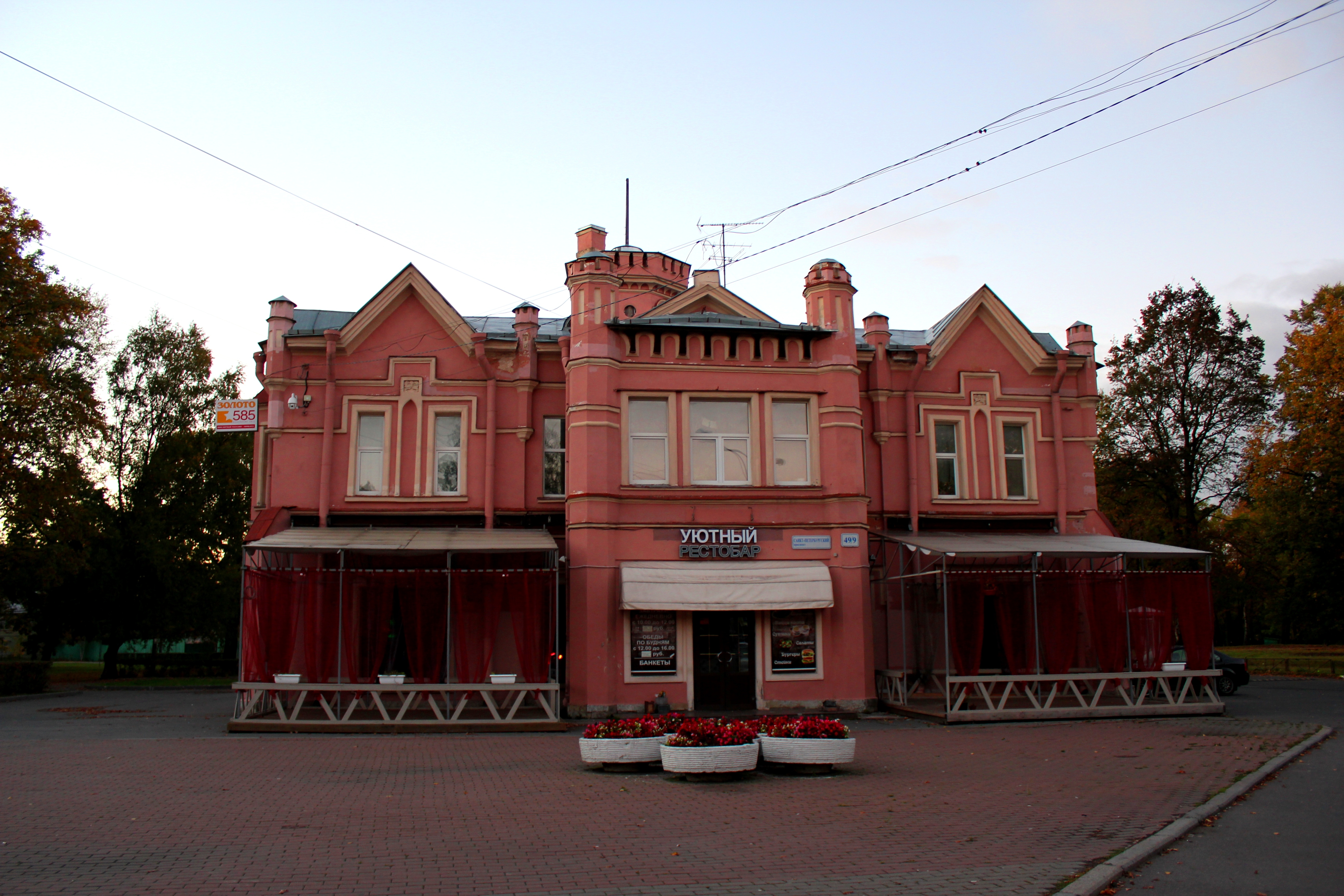 Здание магазина гвардейского экономического общества: Красный проспект (быв. С-Петербургская улица ), 49, Петергоф, Петродворцовый район, Санкт-Петербург